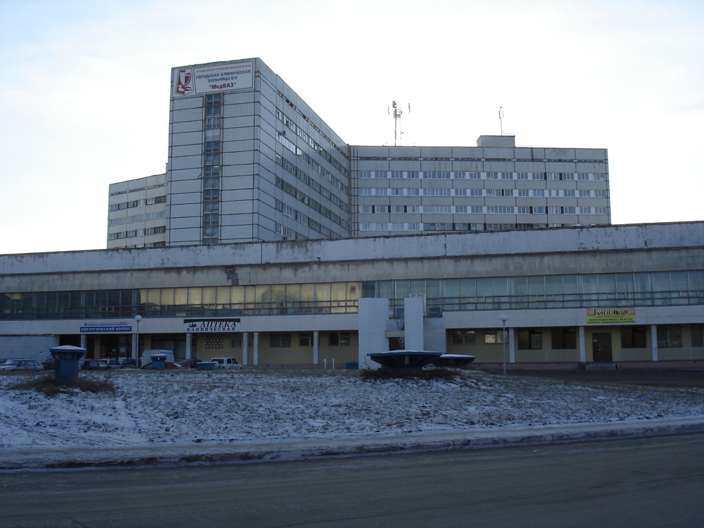 Корпуса клинической больницы №5 Тольятти